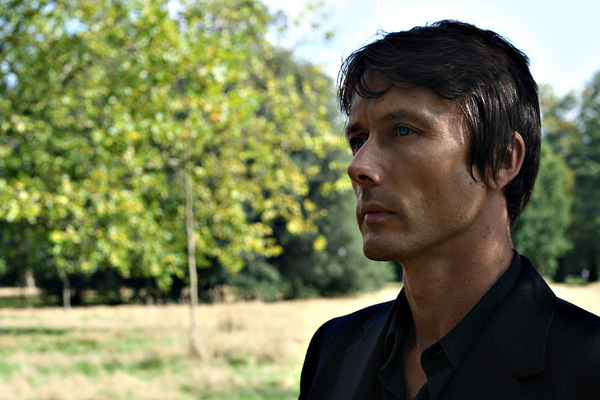 Brett Anderson in Hyde Park